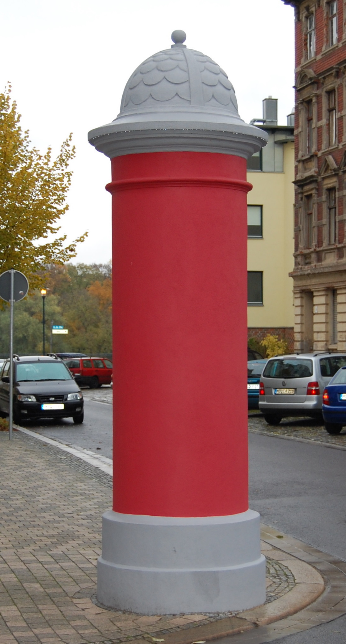 Litfaßsäule Fährstraße Ecke Bleckenburgstr. in Magdeburg, Baudenkmal